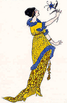 Jacques Doucet Gown